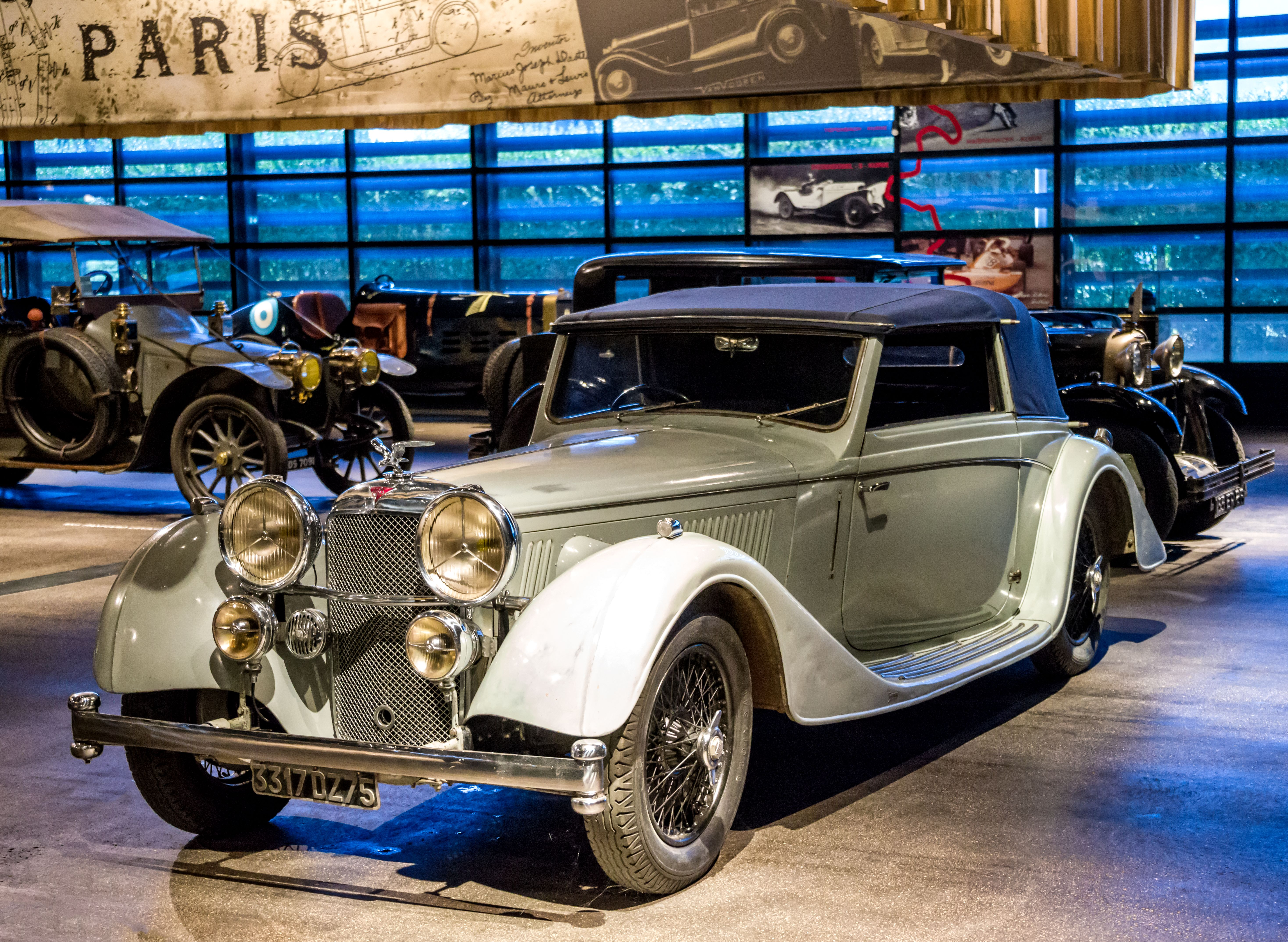 Das Volante Oldtimermuseum in Kirchzarten